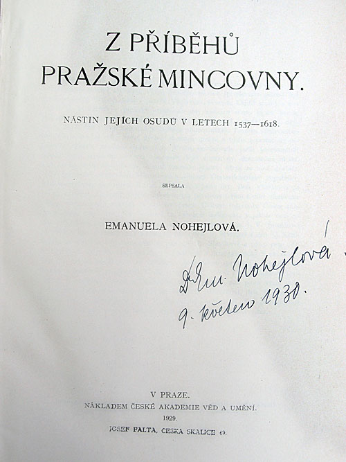 Titulní strana knihy Z příběhů pražské mincovny